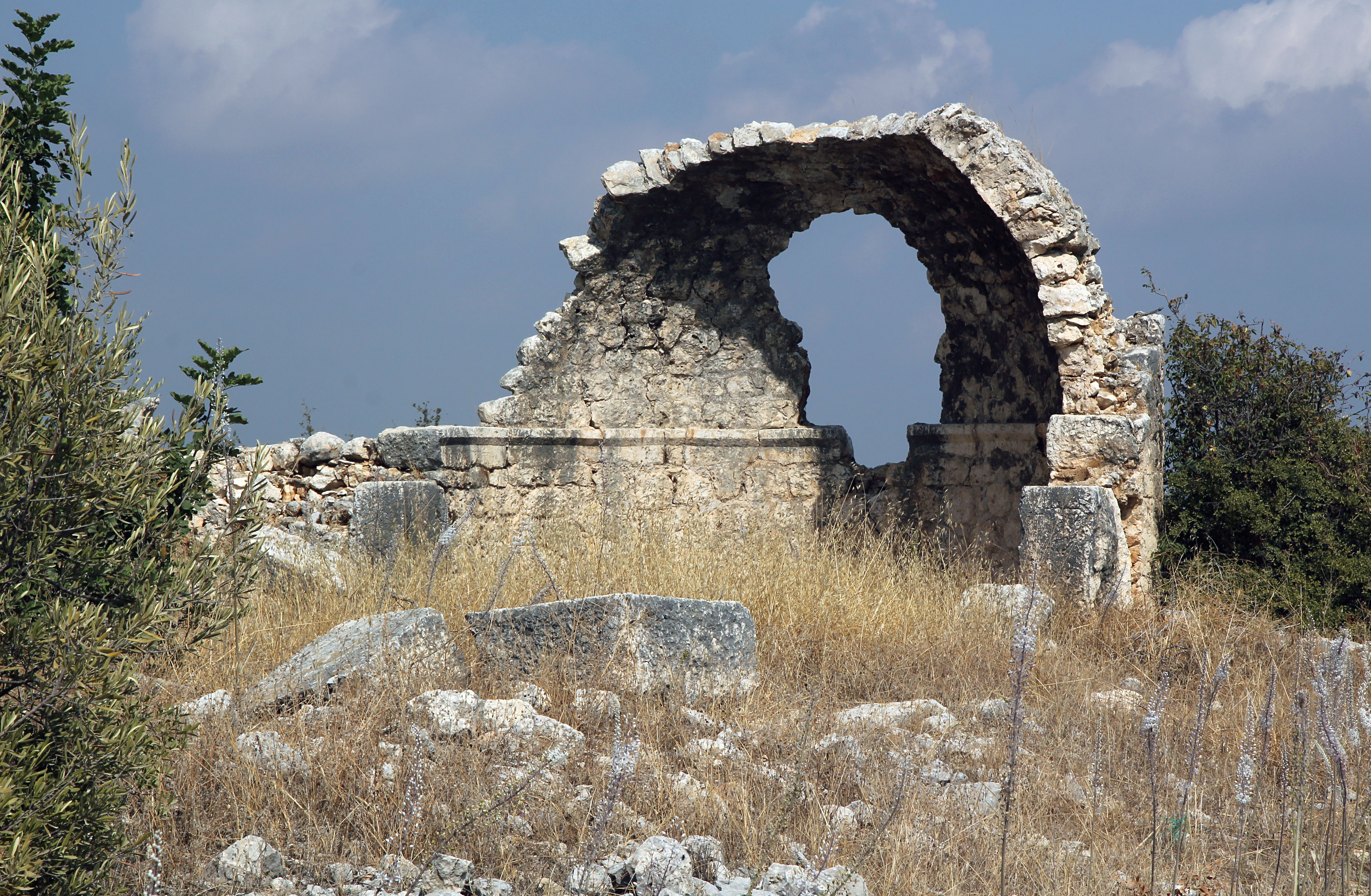 Yapısıgüzel, hellenistisch-römisch-byzantinische Siedlung in Kilikien bei Erdemli, Südtürkei, Südkirche Apsis von Südwesten